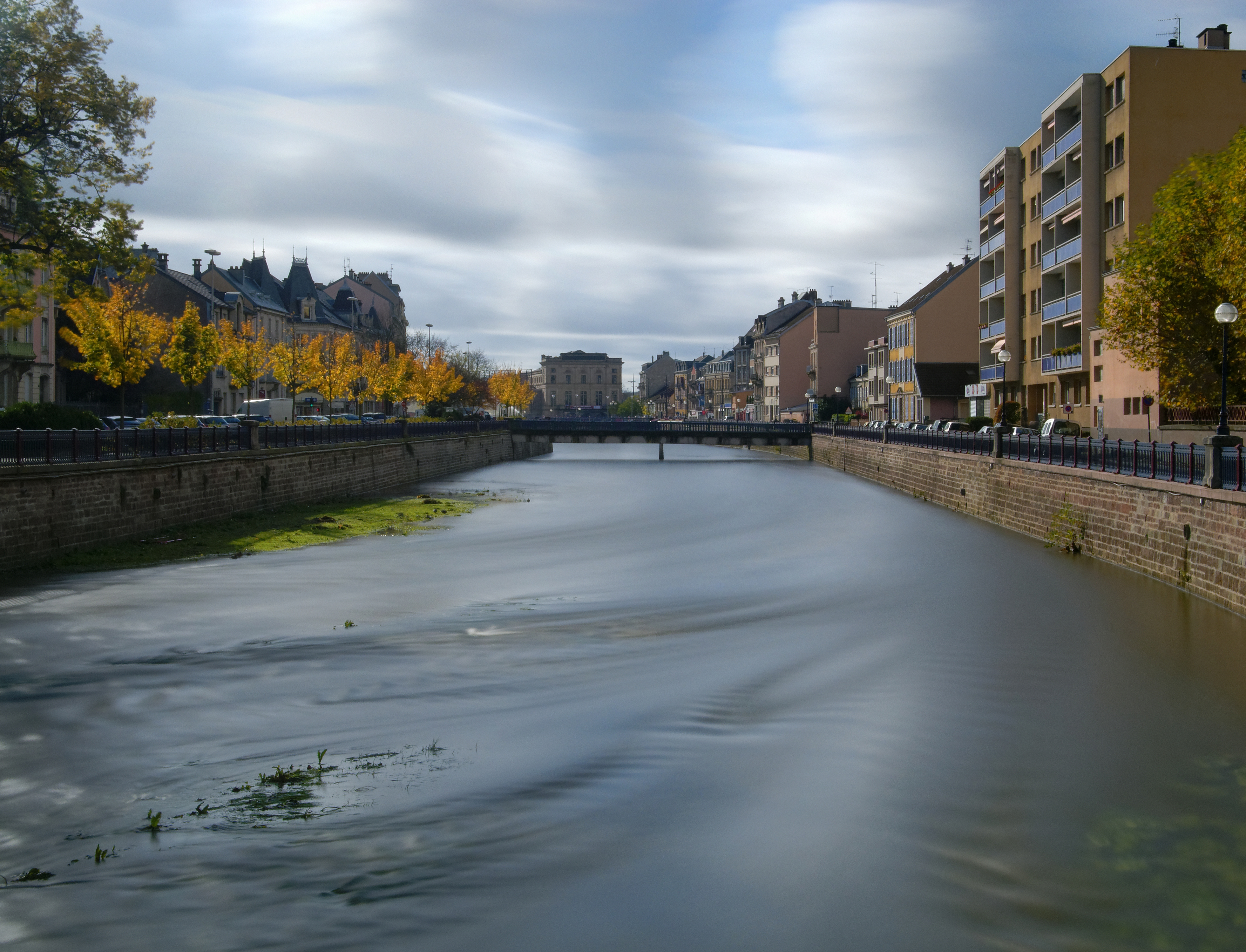 La Savoureuse, à Belfort. Photo réalisée avec un filtre ND400 + ND16.